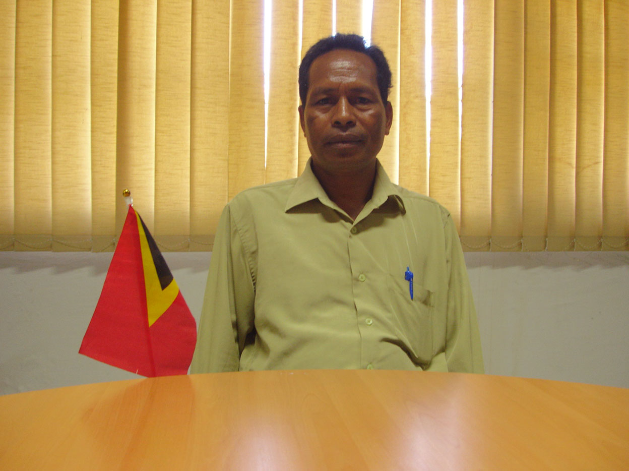 Luis Fernandes, Administrator des Subdistrikts Iliomar